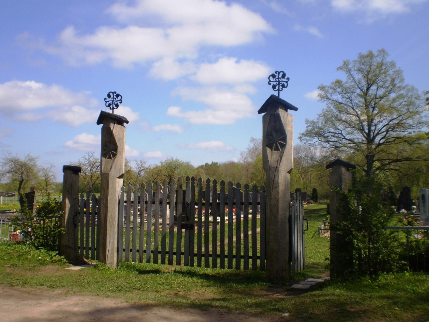 Švenybrasčio kapinių vartai, Kėdainių raj.